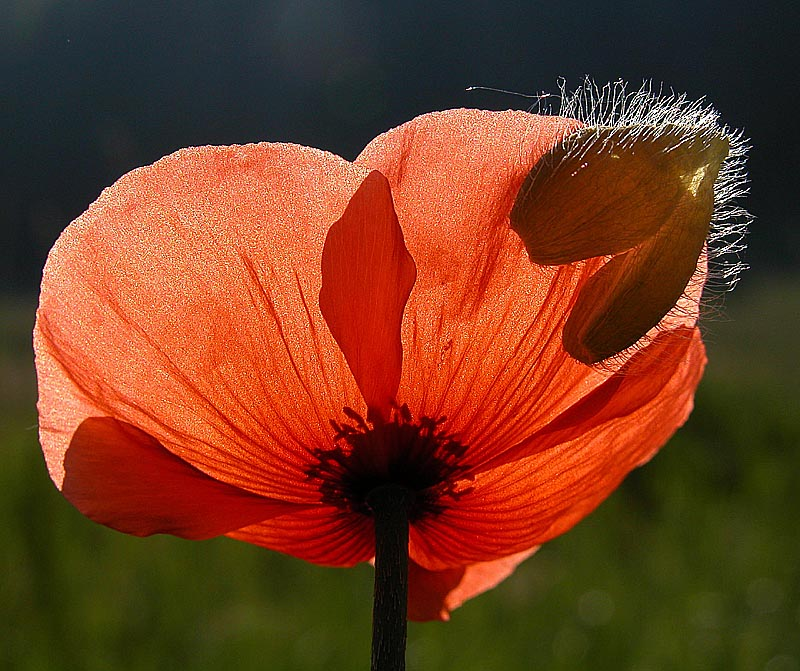 Klatschmohn (Papaver rhoeas), aufgenommen am frühen Morgen auf einer Wiese am Ohleberg in Buseck